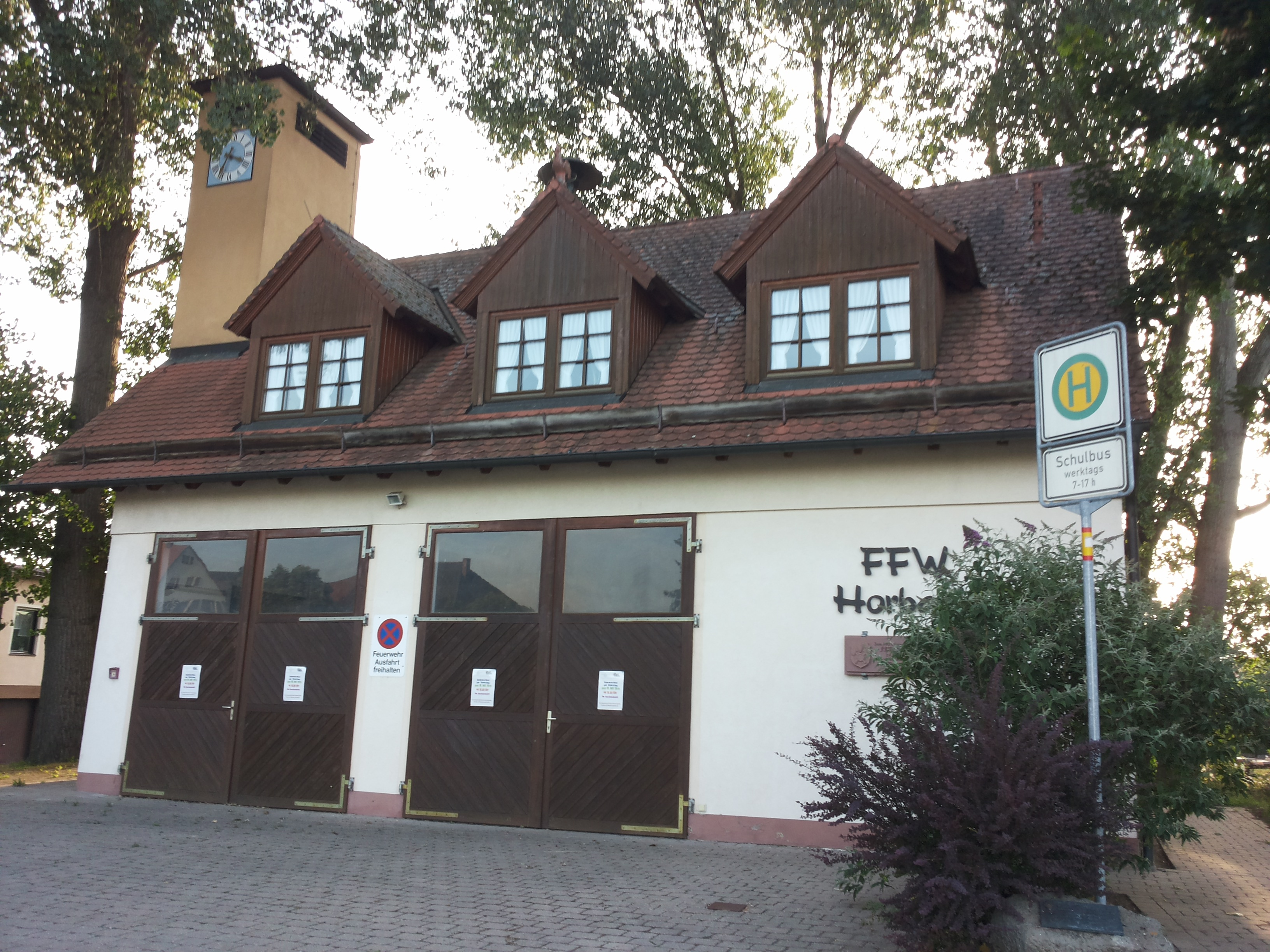 Horbach (Langenzenn) Feuerwehrhaus